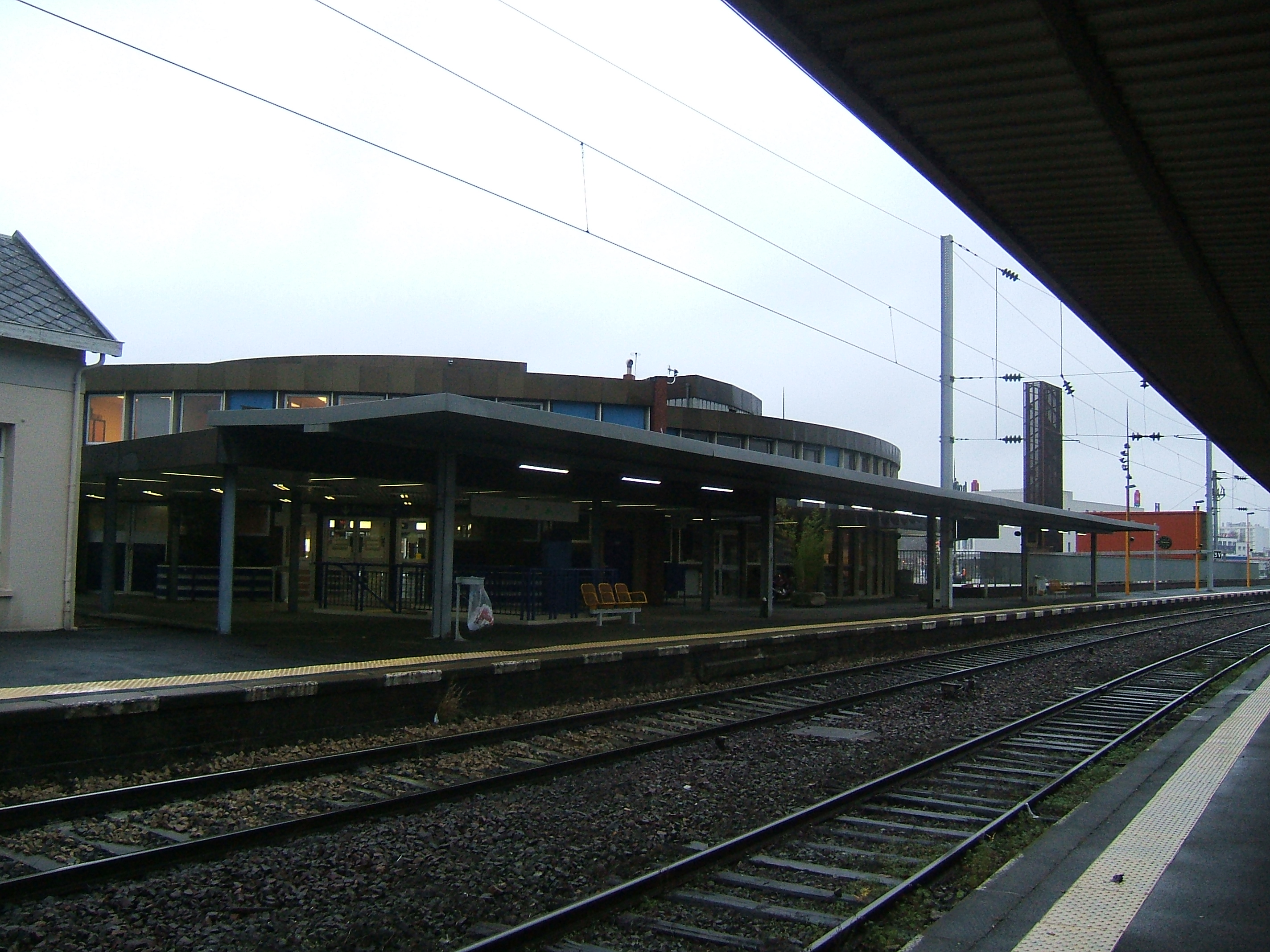 Intérieur de la gare de Maubeuge en 2008.